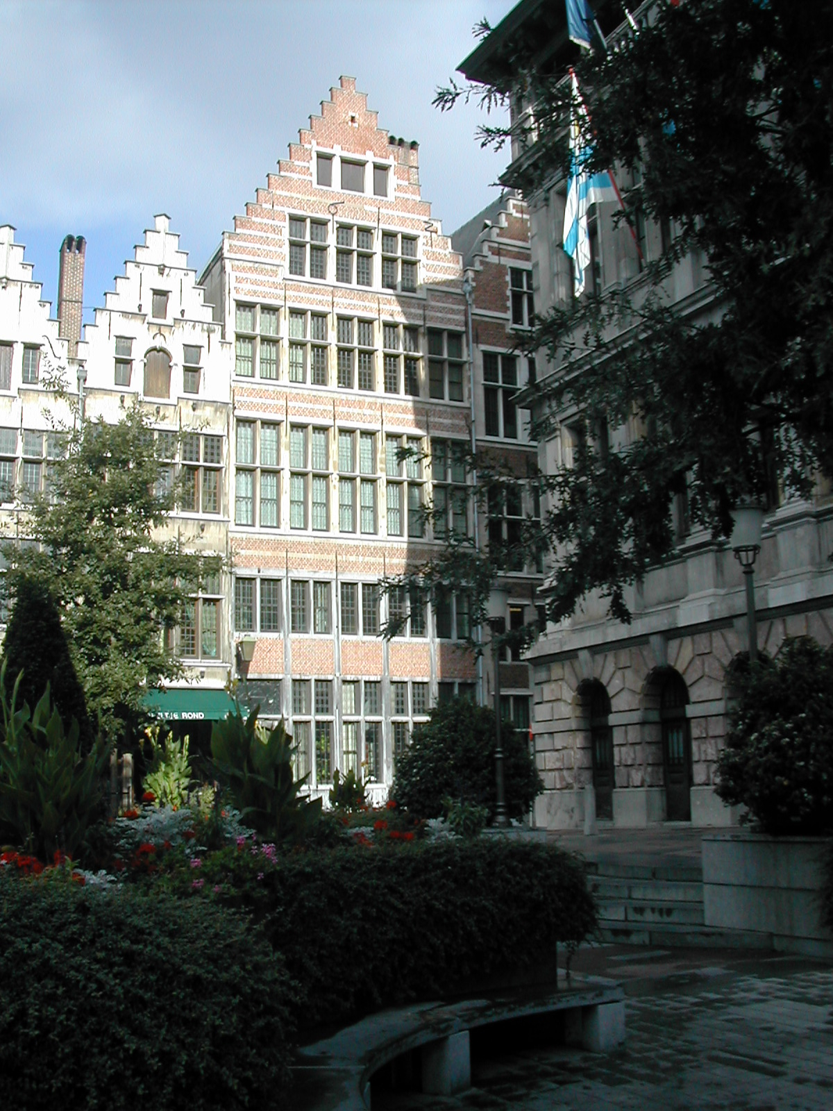 Trapgevels en Antwerp